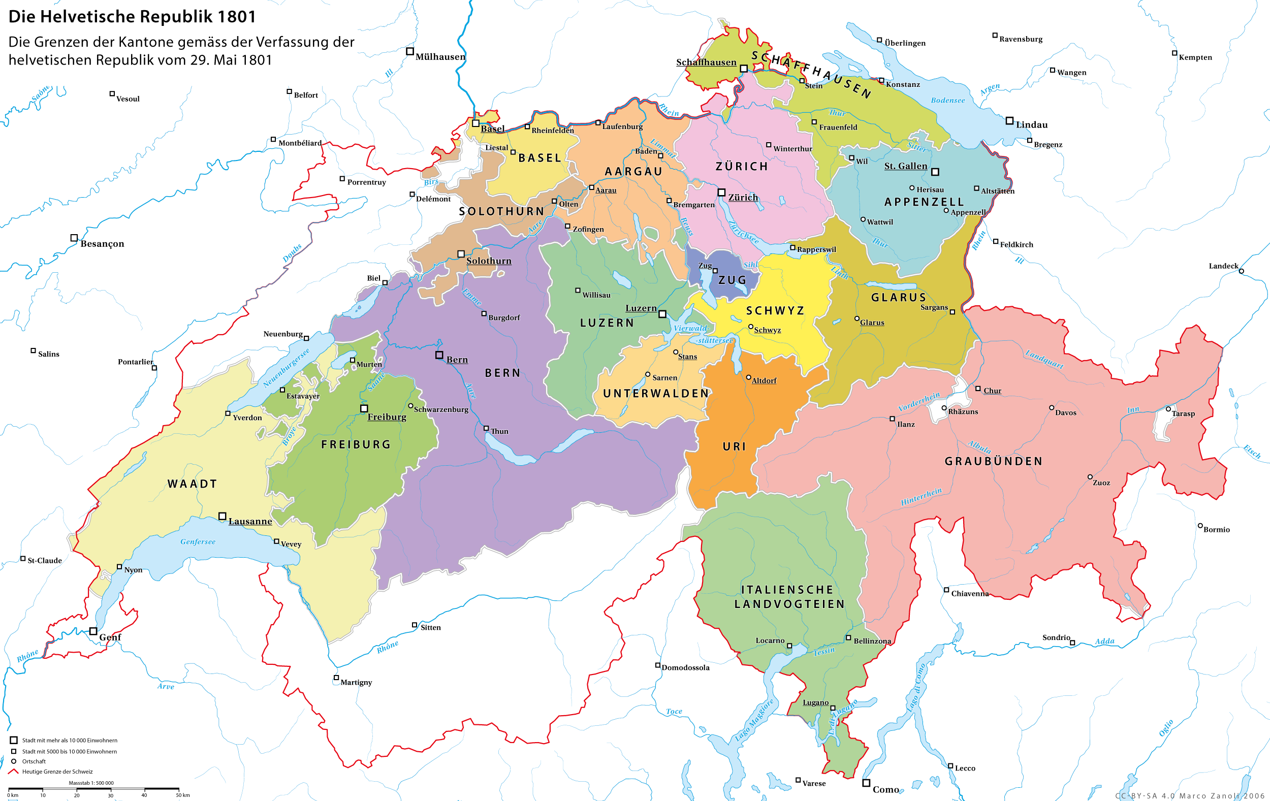 Die Helvetische Republik mit den Kantonsgrenzen gemäss der provisorischen Verfassung von Malmaison, 29. Mai 1801